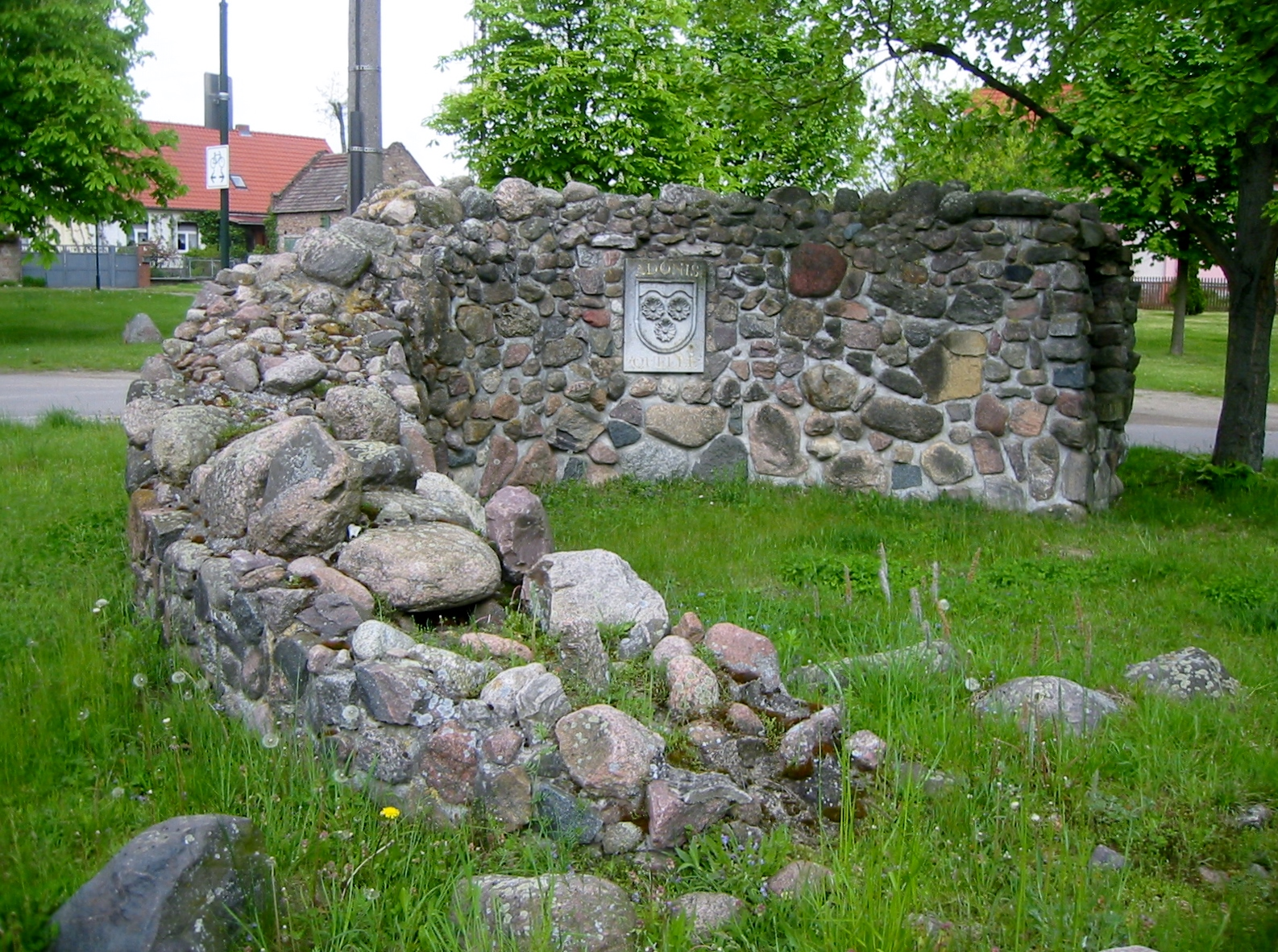 Feldsteinmauer als Teil der Adonisquelle von Roland Rother in Mallnow, einem Ortsteil von Lebus in Märkisch-Oderland (Brandenburg). Das Kunstwerk ist auf einem verfallenen Parkgelände entstanden und symbolisiert die Region, die eiszeitlich geformt wurde. Die Namensgebung erinnert an die Adonisröschenblüte.